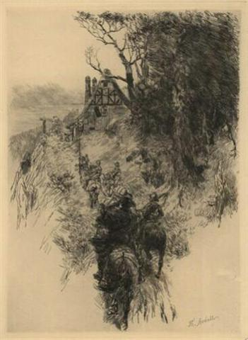 Radierung "Kriegszeiten" 1894 von Theodor Rocholl